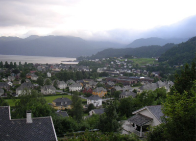 Usikt fra Brekkeplatået mot øvre del av Åbøbyen i 2004. Til venstre i midten av bildet ser vi Sauda sentrum, og i midten ser vi Fløgstad og Nedre Hølland.